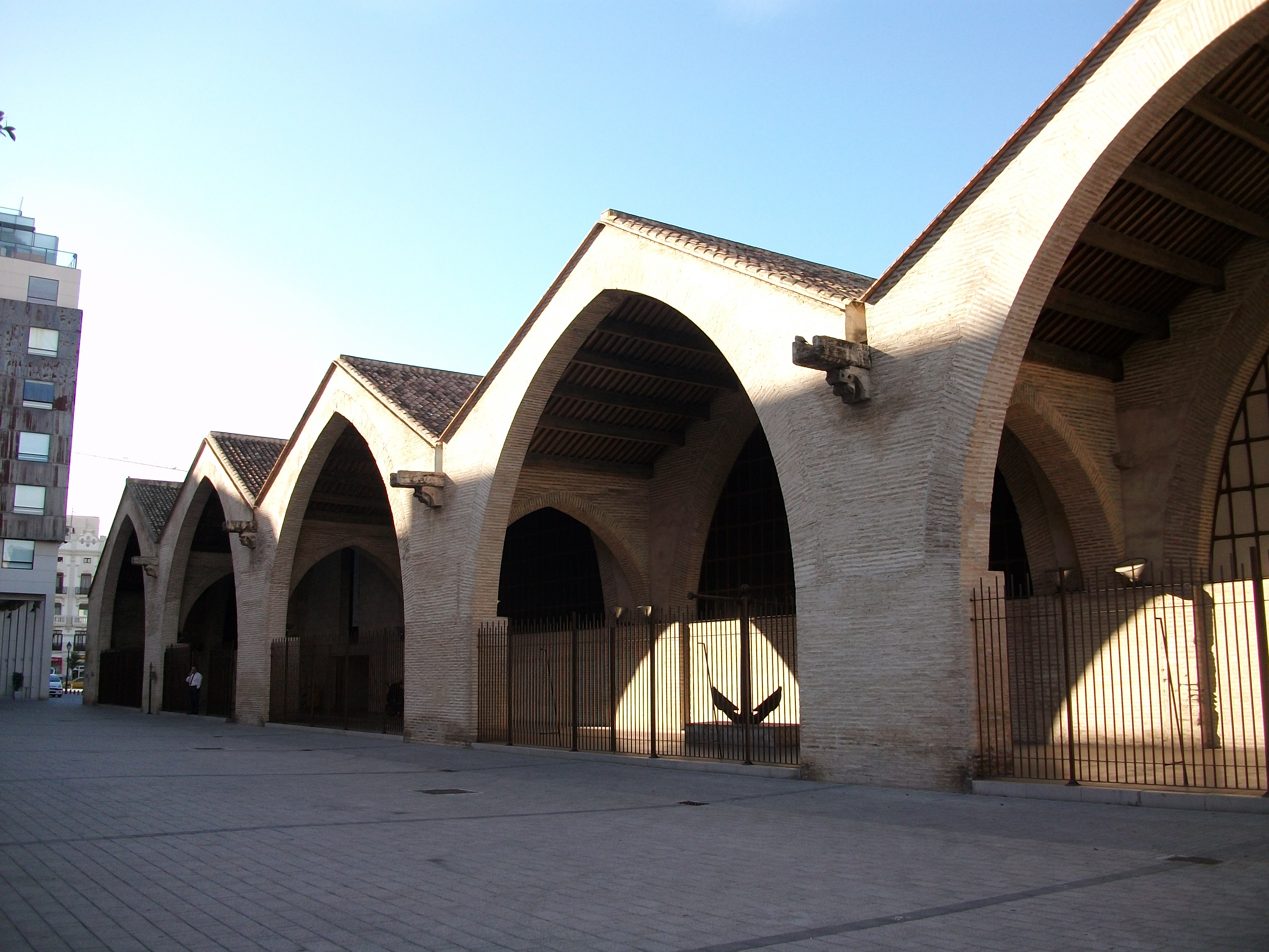 Exterior de les drassanes del Grau, l'Horta, País Valencià.